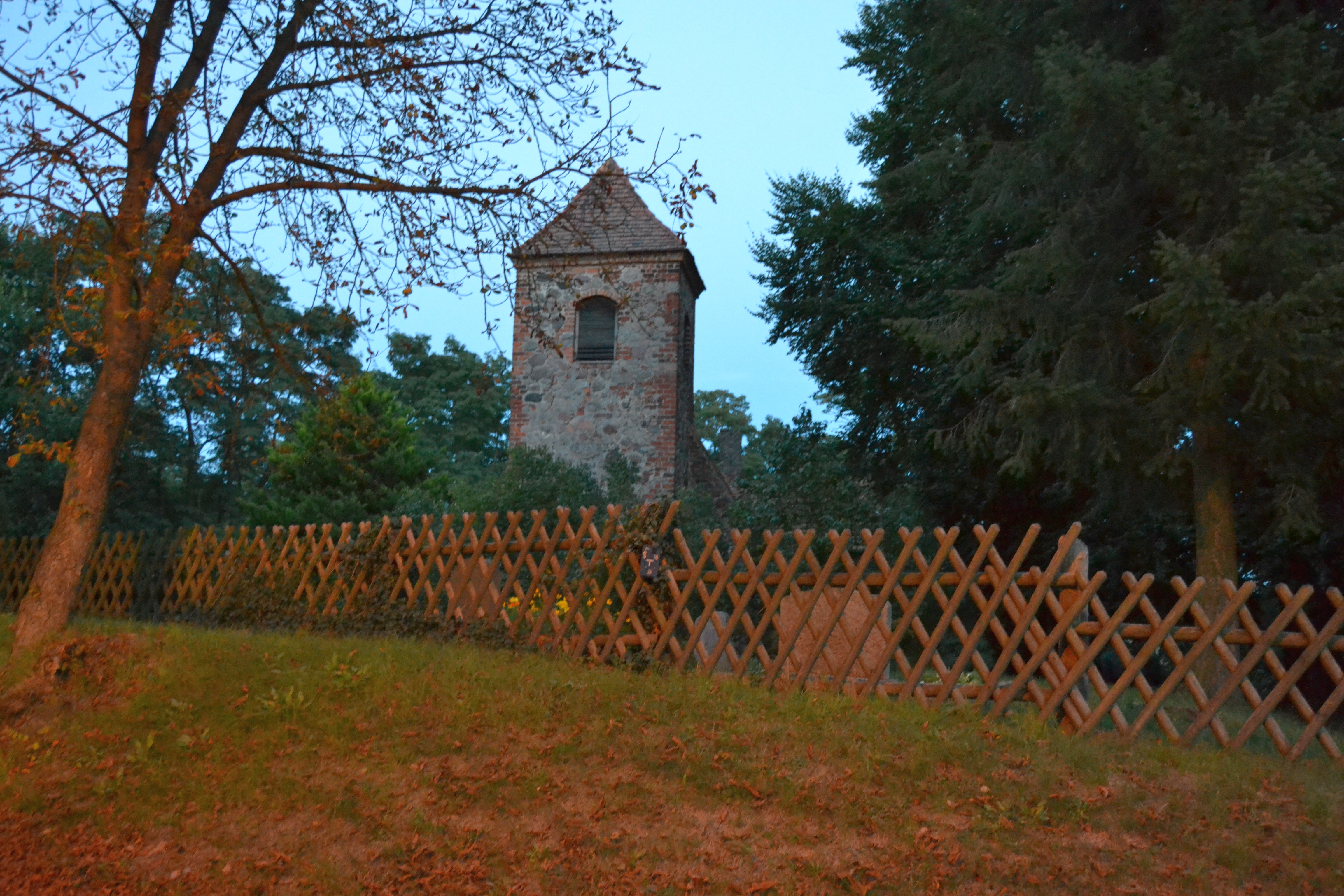 Evangelische Dorfkirche von Alt-Rosenthal; sie wurde von 1697 bis 1698 erbaut, dabei wurden Reste eines Vorgängerbaues verwendet.